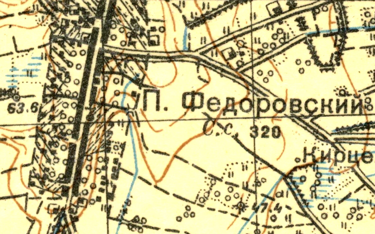 Топографическая карта Ленинградской области, квадрат О-36-14-А (п. Фёдоровский), деревня Фёдоровское